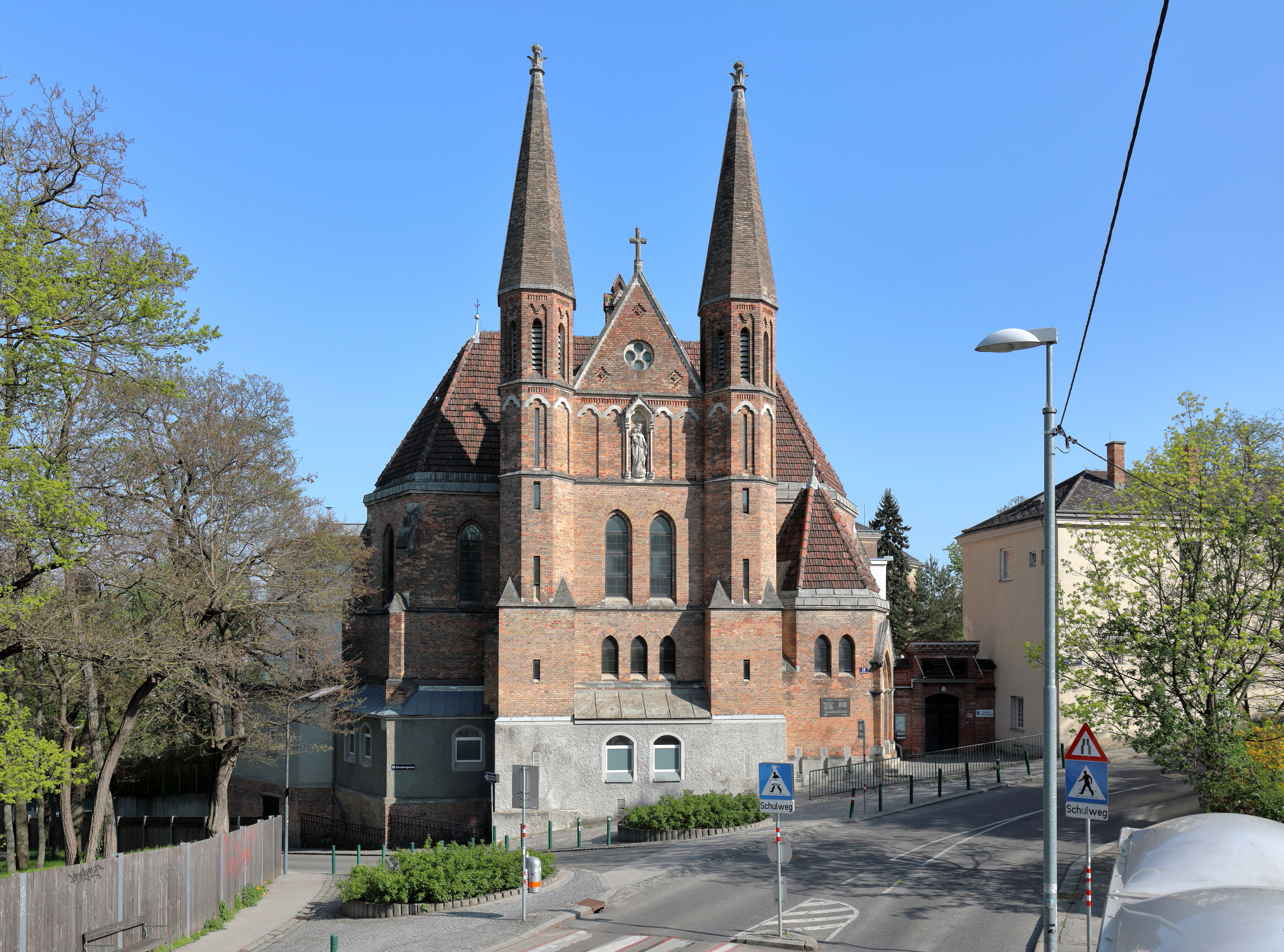 Die Doppelturmfassade der "Kirche" (offiziell als Kapelle bezeichnet) des Konvents der Dominikanerinnen in der Schloßberggasse 17 in Hacking, ein Bezirksteil des 13. Wiener Gemeindebezirkes Hietzing. Die neugotische Kirche mit zwei achteckigen Türmen über quaderförmigem Sockeln wurde von 1885 bis 1886 nach Plänen des Architekten Richard Jordan errichtet.